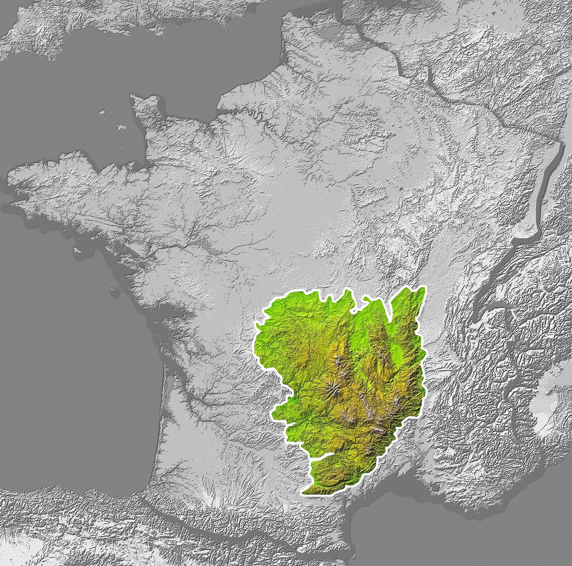 Situation du Massif central sur la carte de France